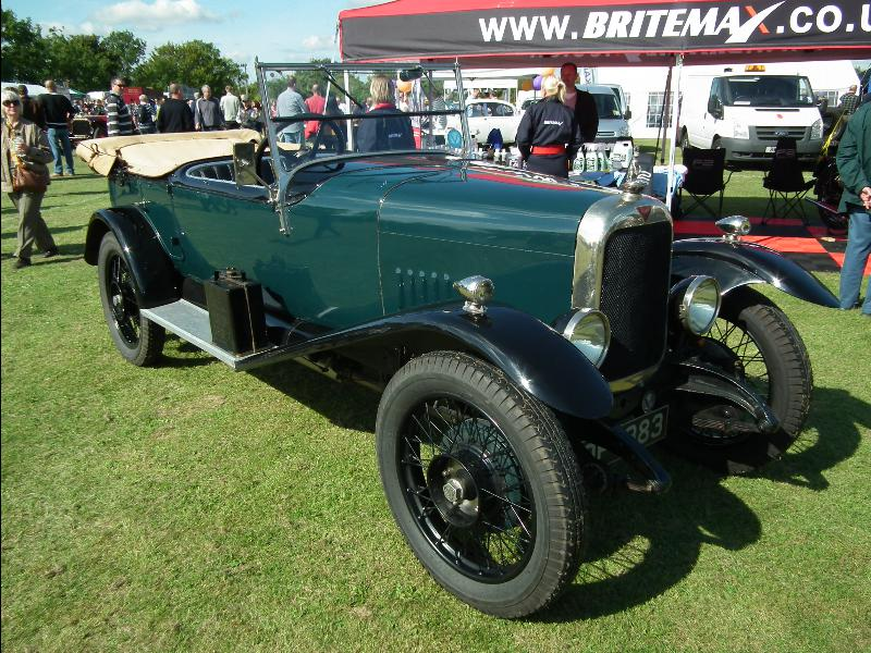 Alvis 12/50 1927- Kop Hill 2012